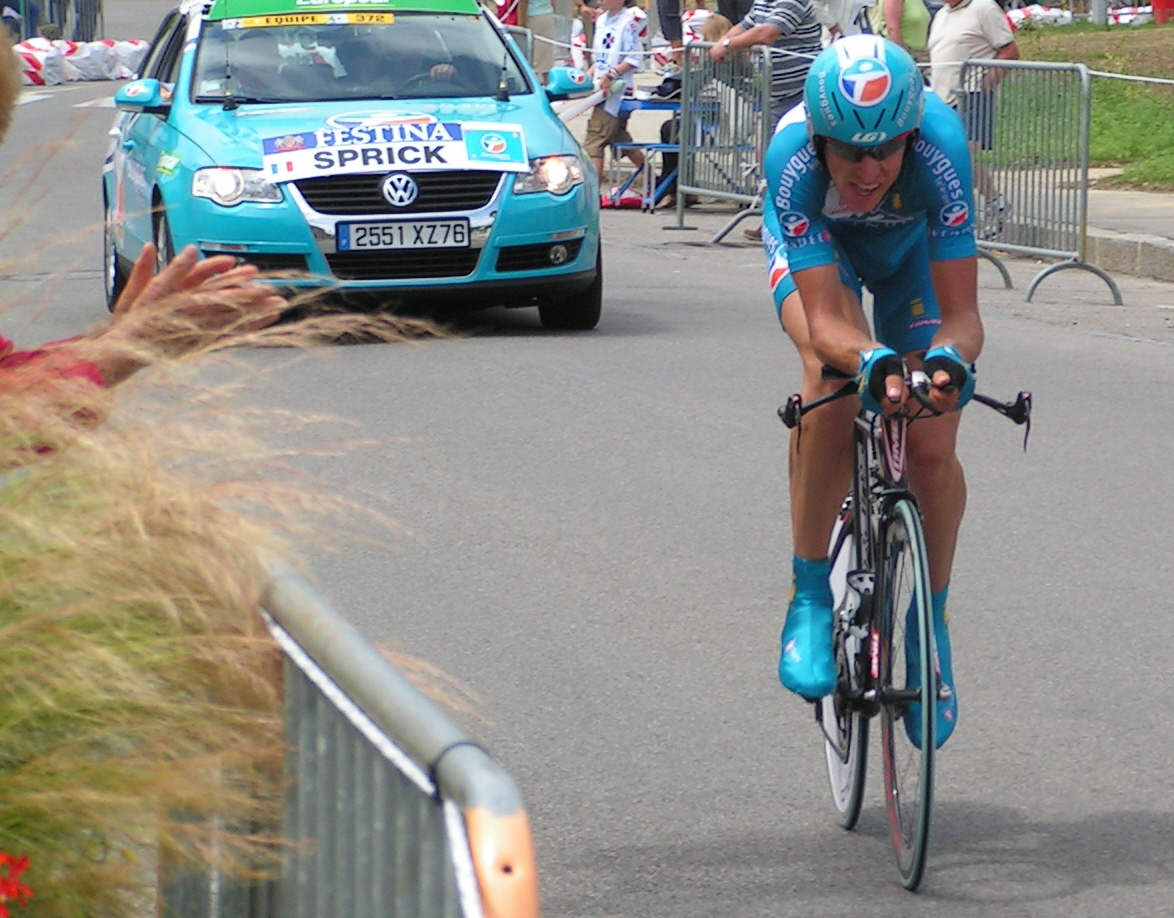 Matthieu Sprick, Photo prise sur le tour de France 2006 par moi-même